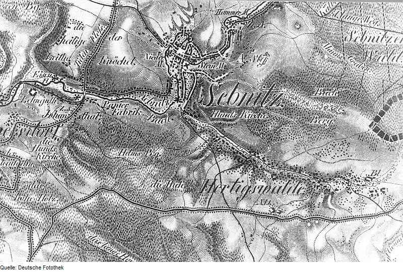 Original image description from the Deutsche Fotothek Sebnitz-Hertigswalde. Oberreit, Sect. Stolpen, 1821/22